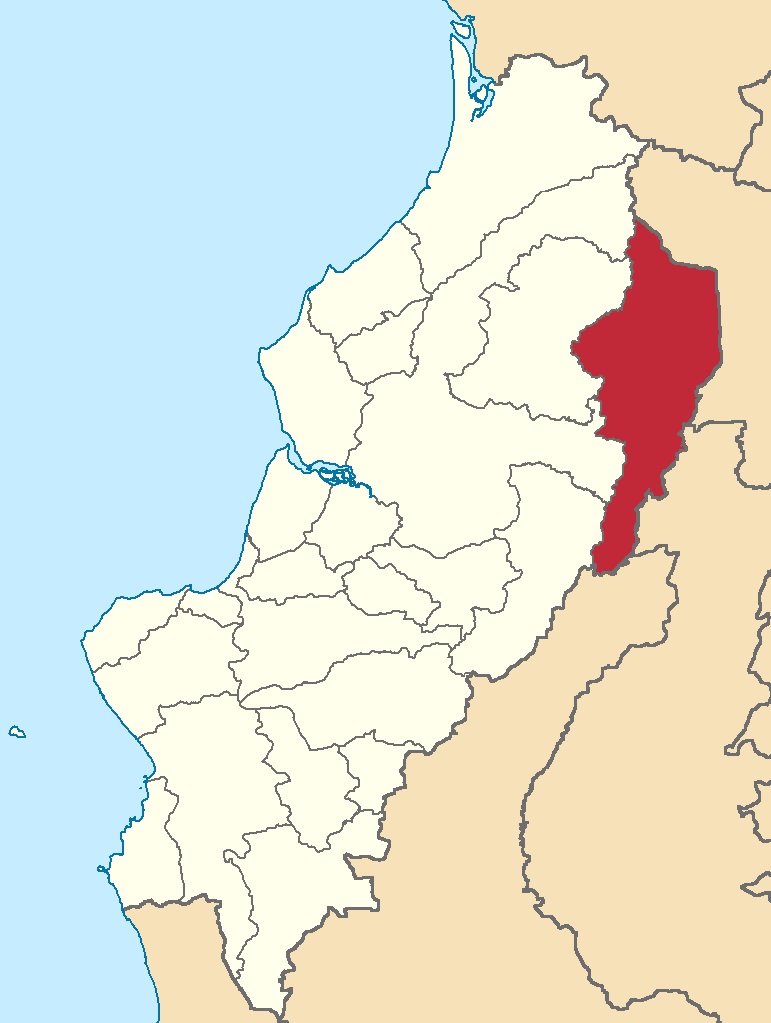 Mapa localizador del cantón en Manabí, Ecuador